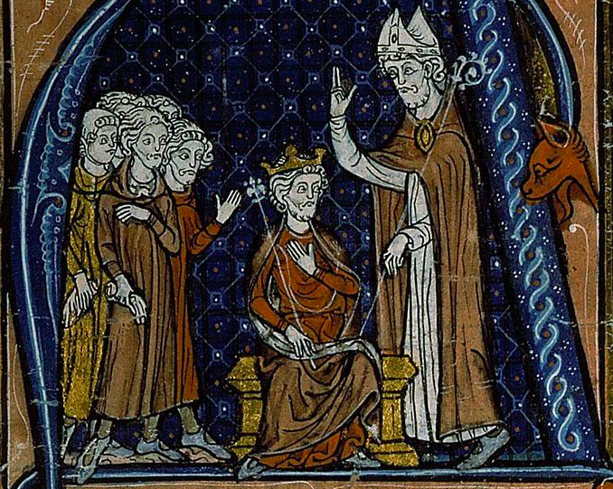 Louis V, fils de Lothaire, fut couronné à Compiègne